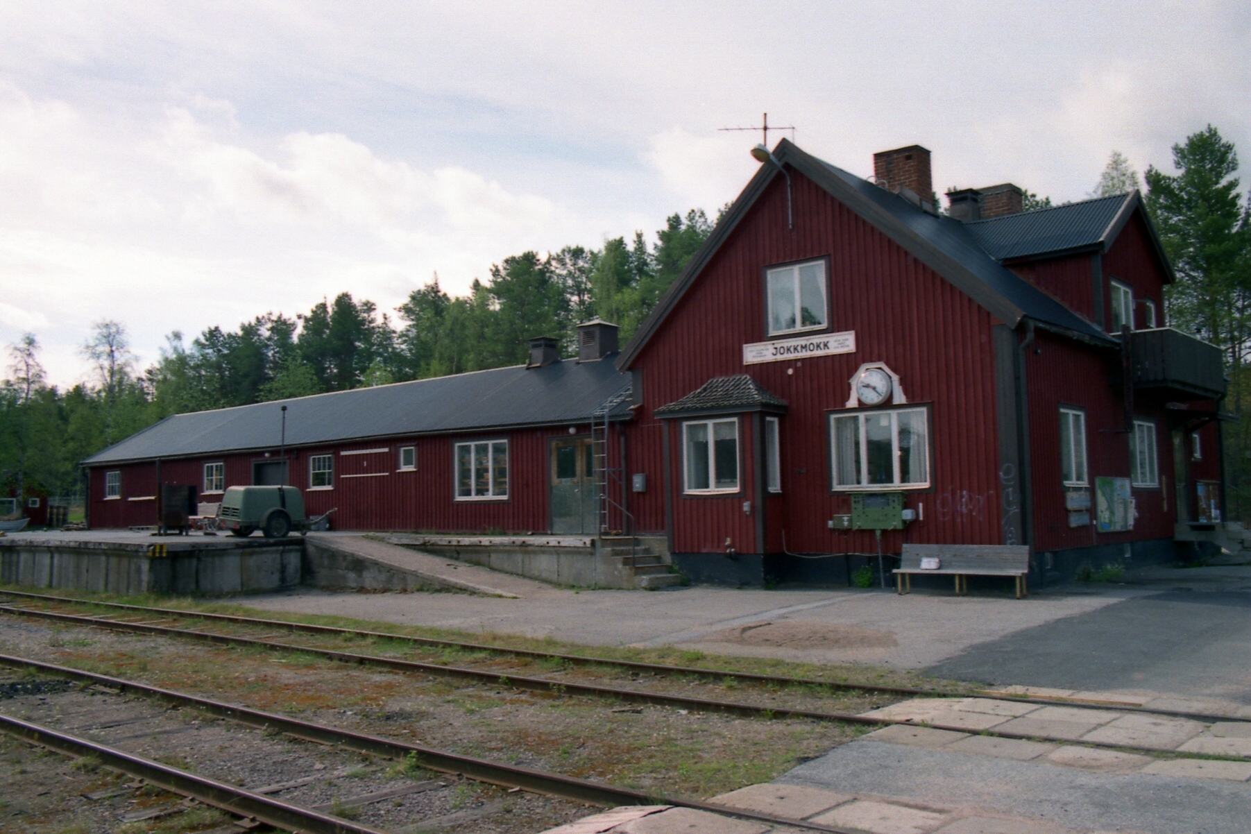 Empfangsgebäude in Jokkmokk 29.05.00